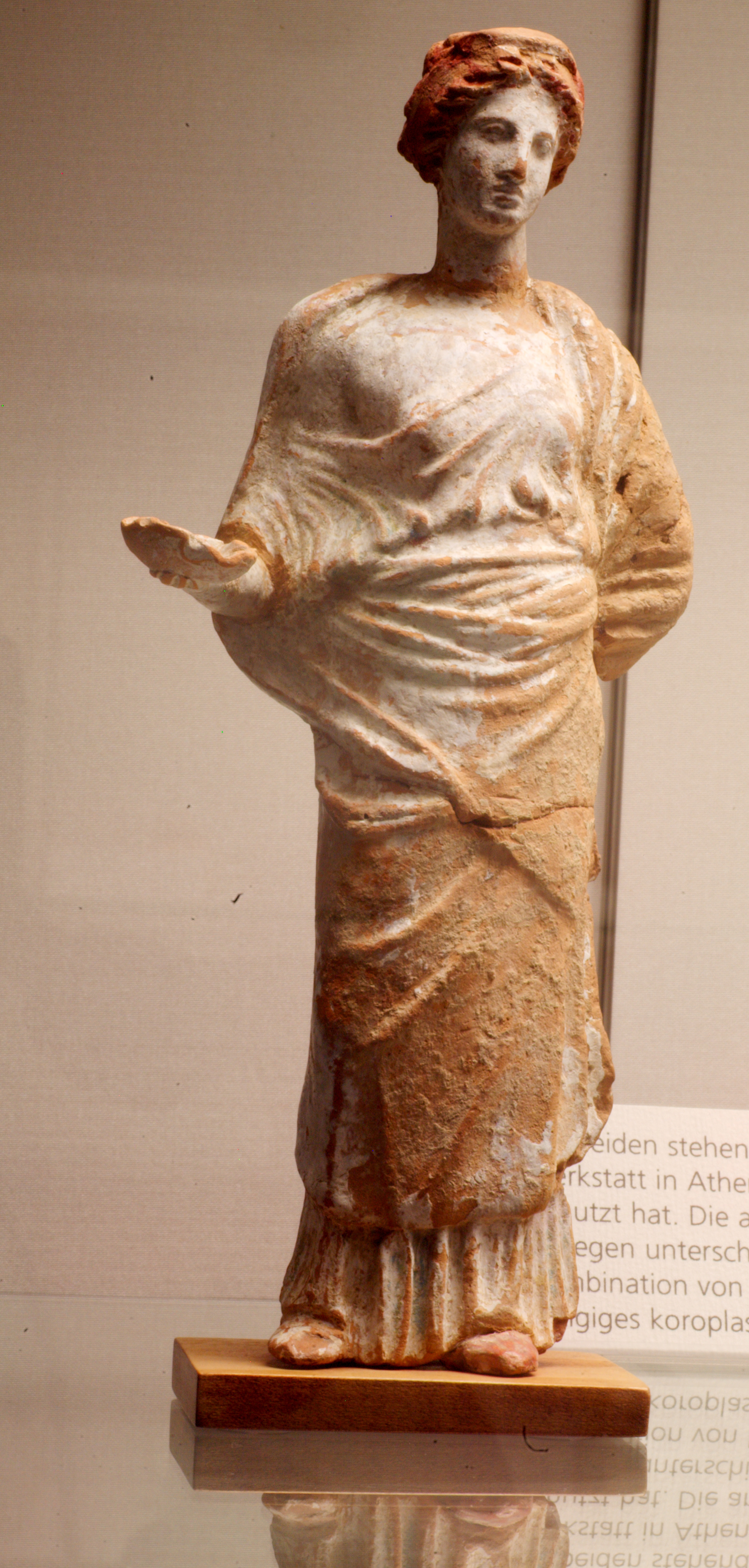 Attische Terrakottastaue eines opfernden Frau. In der rechten Hand die Operschale. Attische Terrakotta aus dem 4.Jhdt. v.Chr. Staatliche Antikensammlungen München